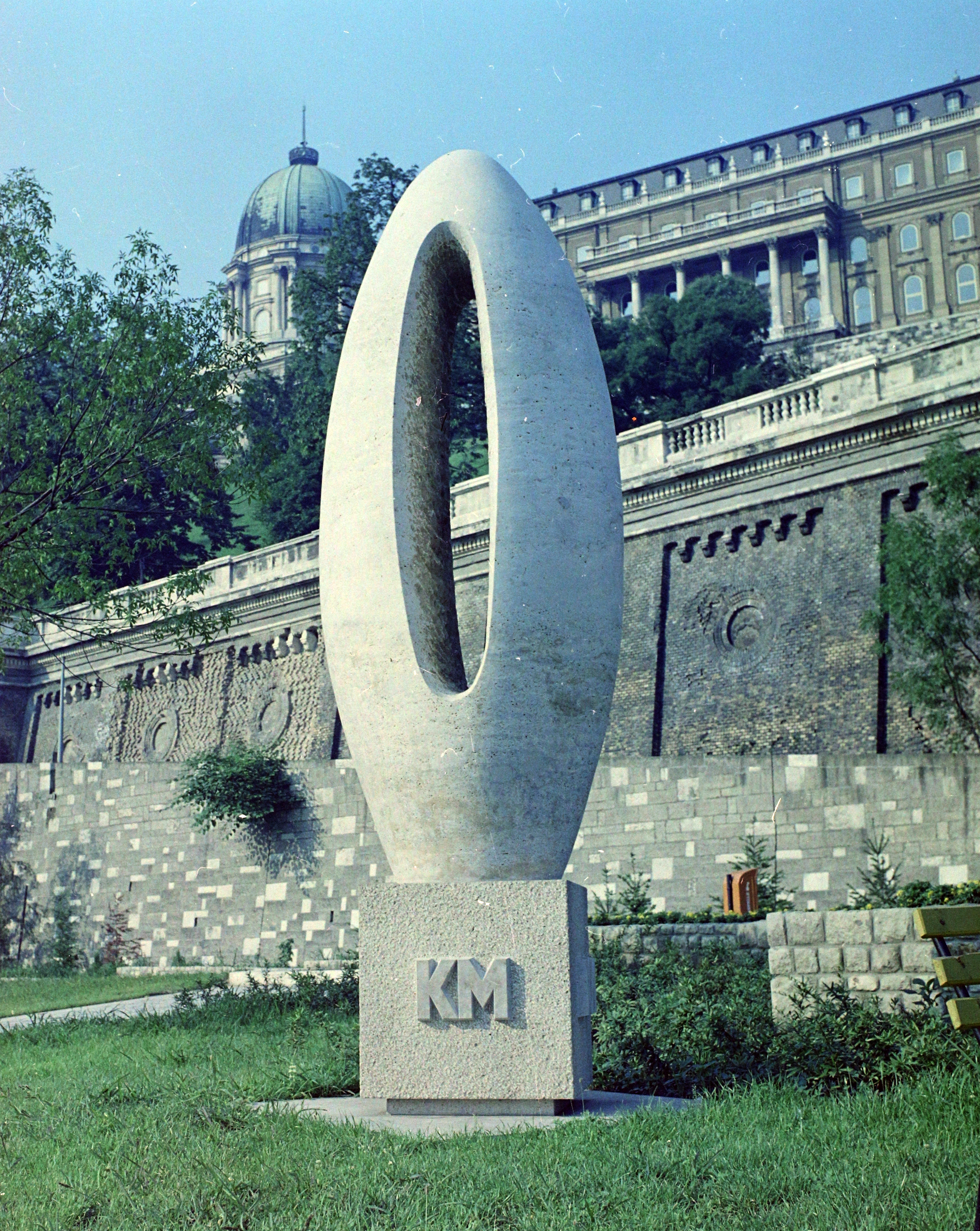 Clark Ádám tér, "0" kilométerkő (Borsos Miklós, 1975.), háttérben a Királyi Palota.